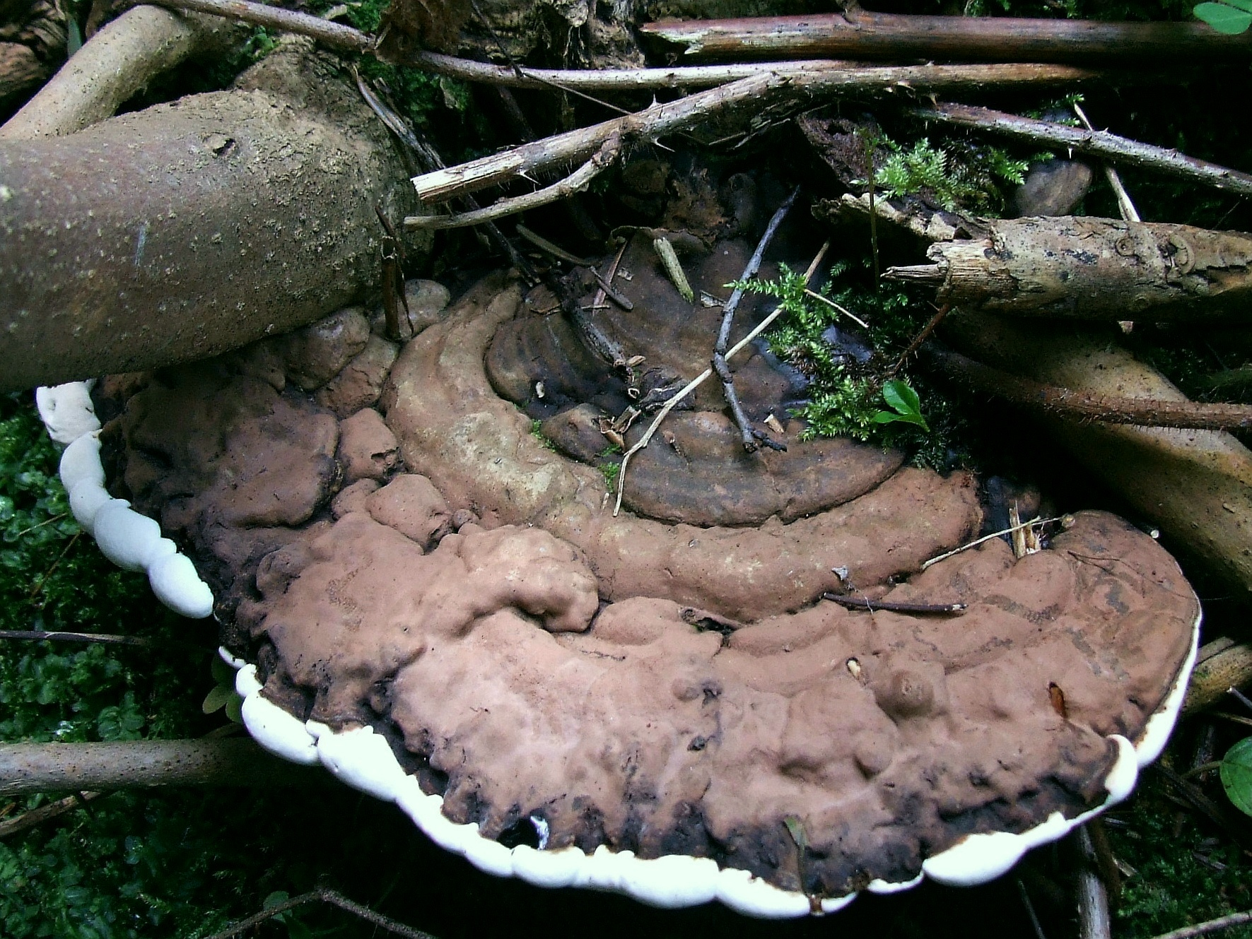 Ganoderma applanatum